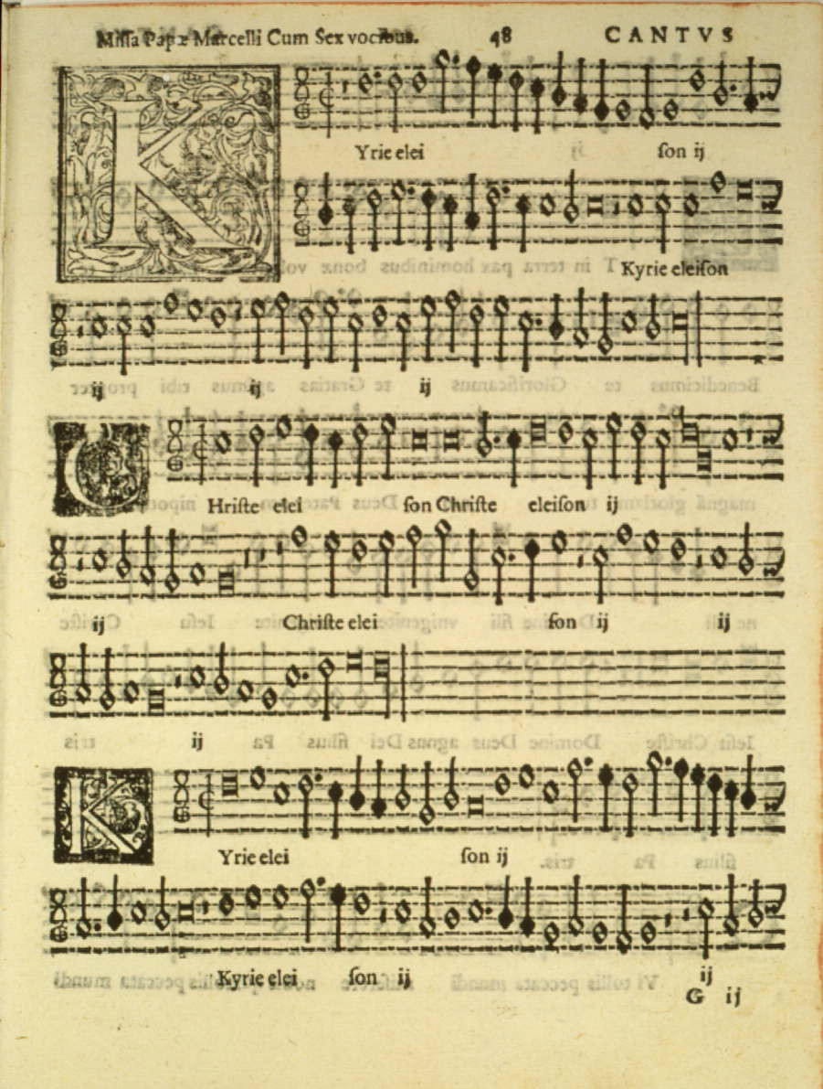 Beginn der Missa Papae Marcelli (um 1565) von Giovanni Pierluigi da Palestrina Beispiel für Mensuralnotation